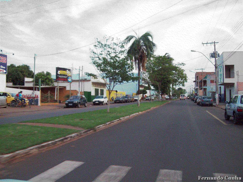 Iturama - Minas Gerais